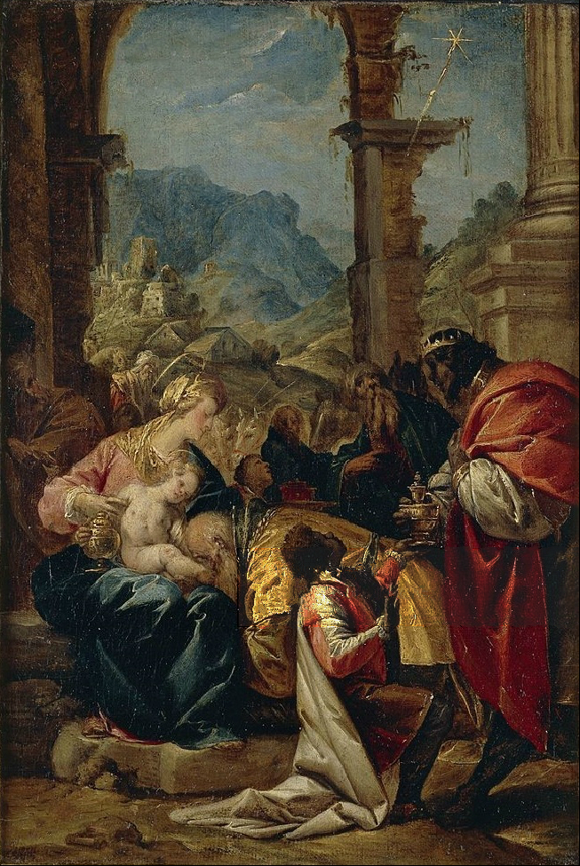 Adorazione dei Magi